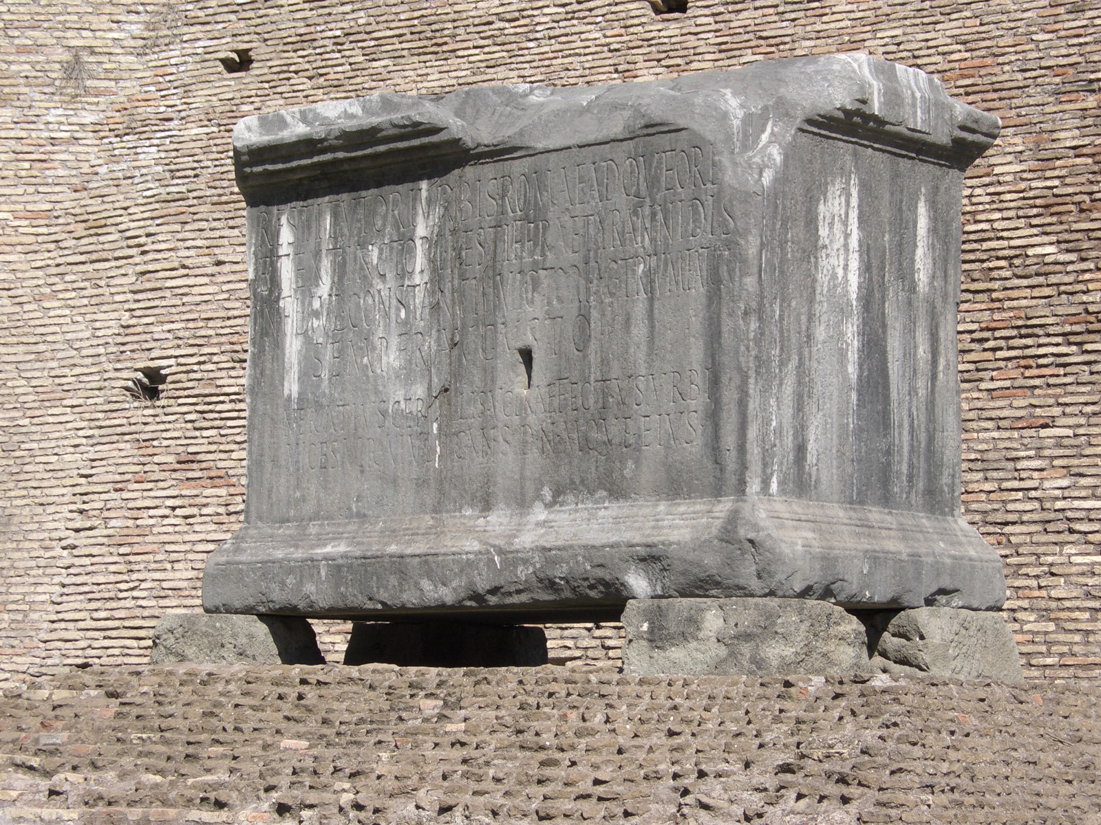 Base della statua eretta da Nerazio Cereale in onore di Costanzo II nel Foro Romano